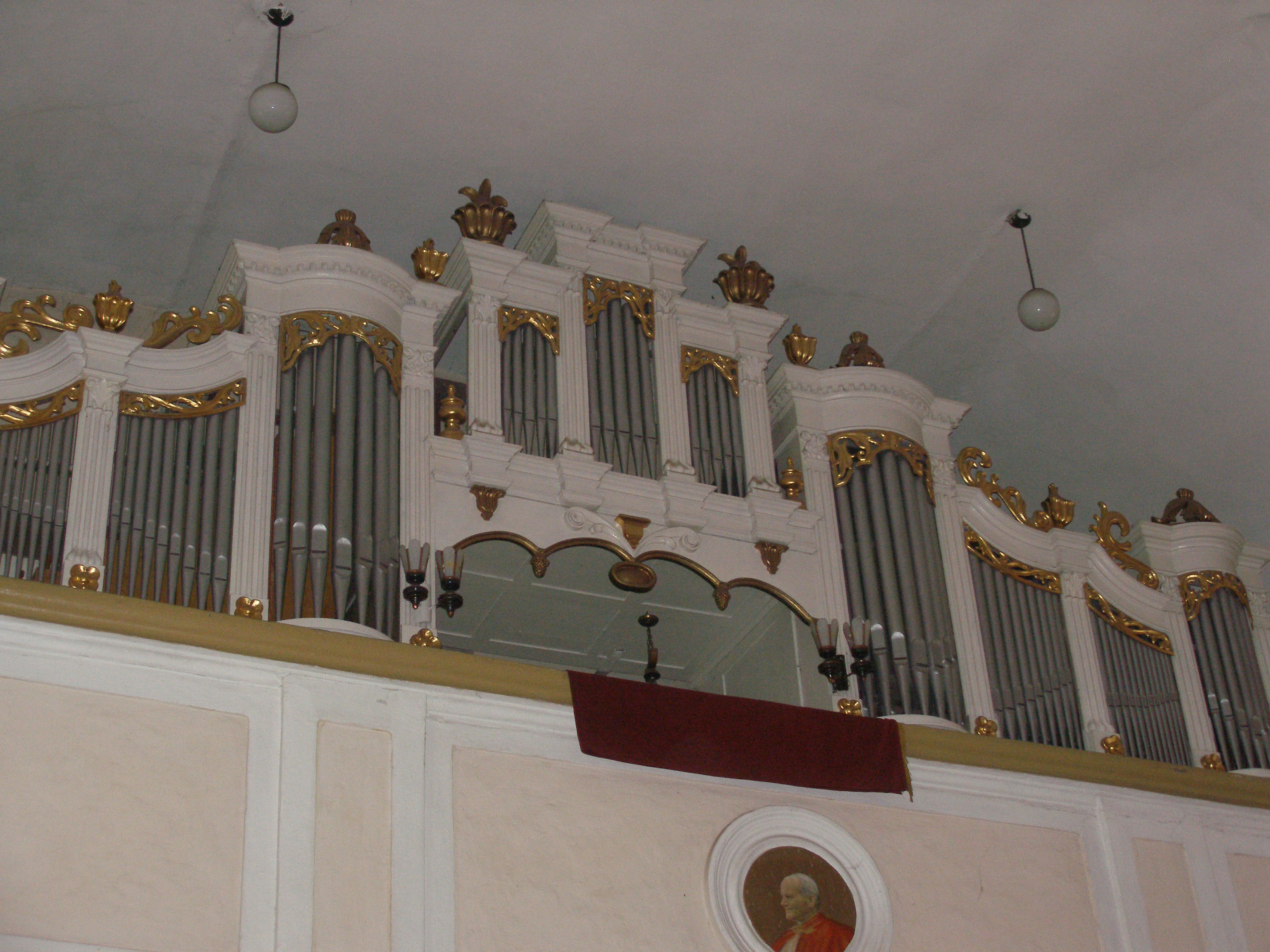 Organy w kościele WNMP Skierbieszów